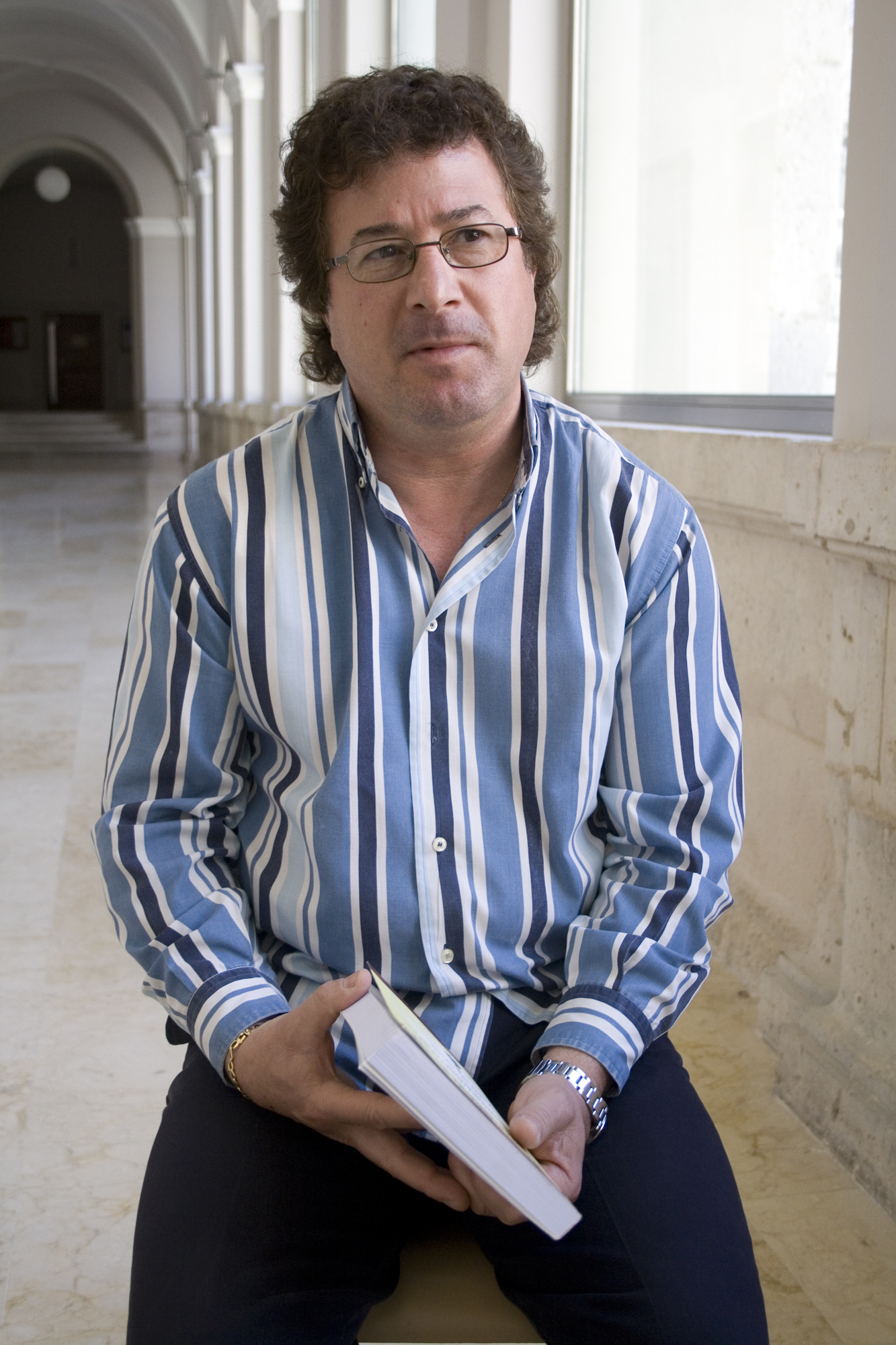 Raad Salam Naaman.